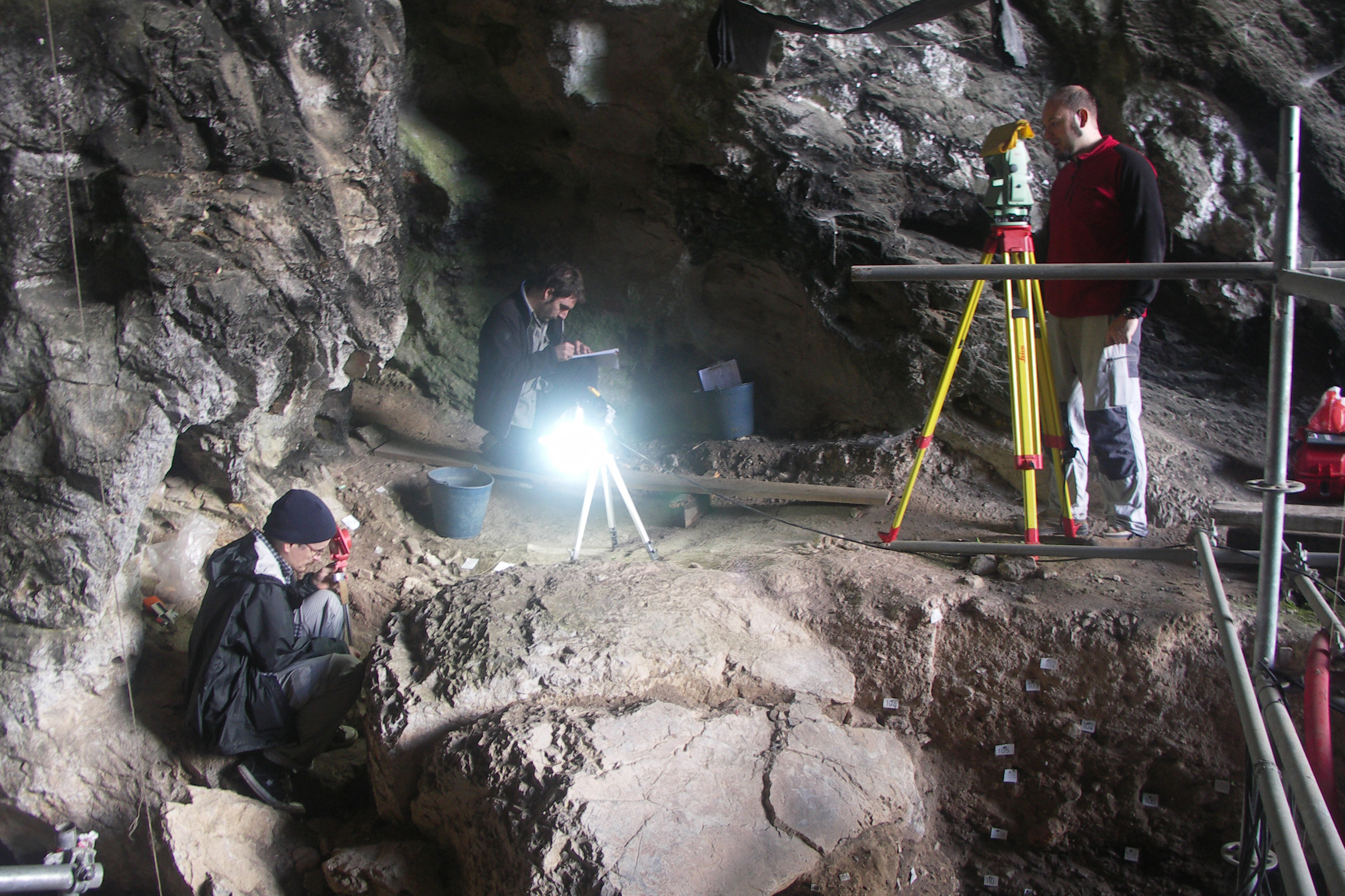 Hallados restos humanos en la cueva del Mirón (Cantabria, España) que podrían corresponder al primer enterramiento del Magdaleniense encontrado en la Península Ibérica.